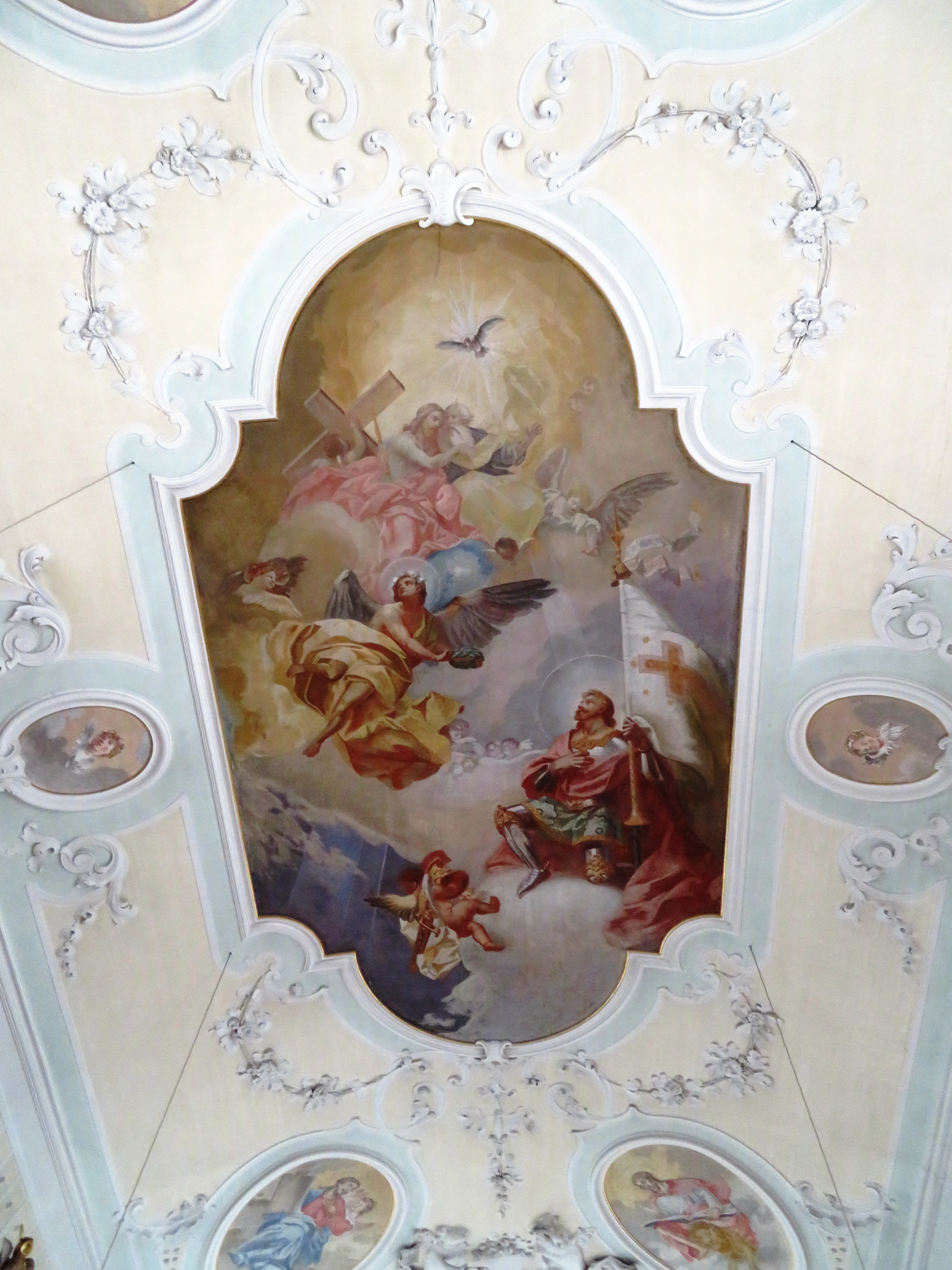 Kirche St. Mauritius in Stein